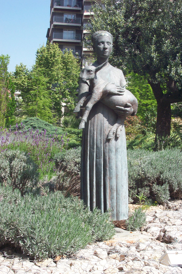 Monumento a Isabel Besora, La Pastoreta, en Reus (Spain)